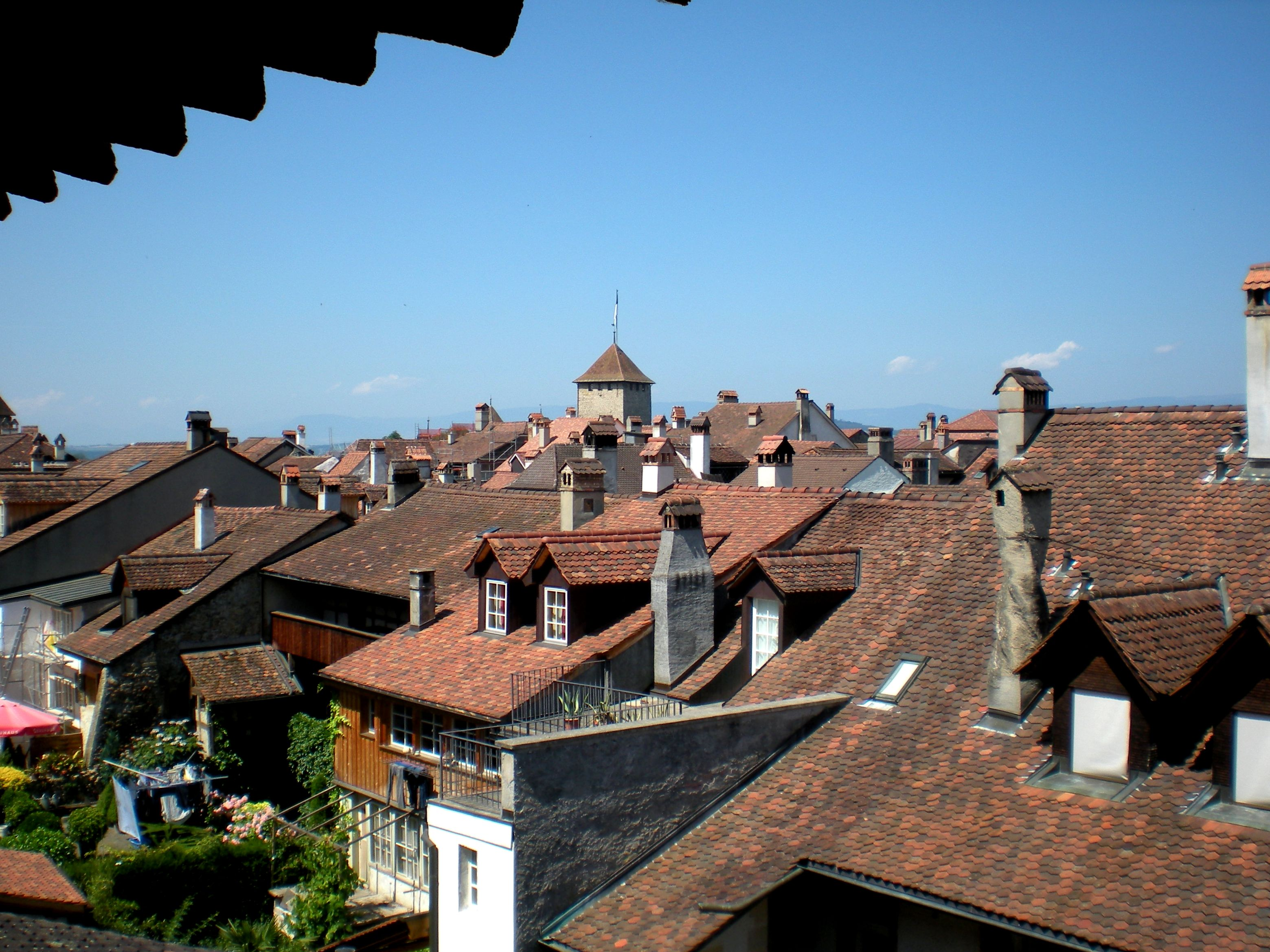 Tejados del casco histórico de Murten (Suiza), vistos desde el camino de ronda que recorre las murallas de la ciudad.